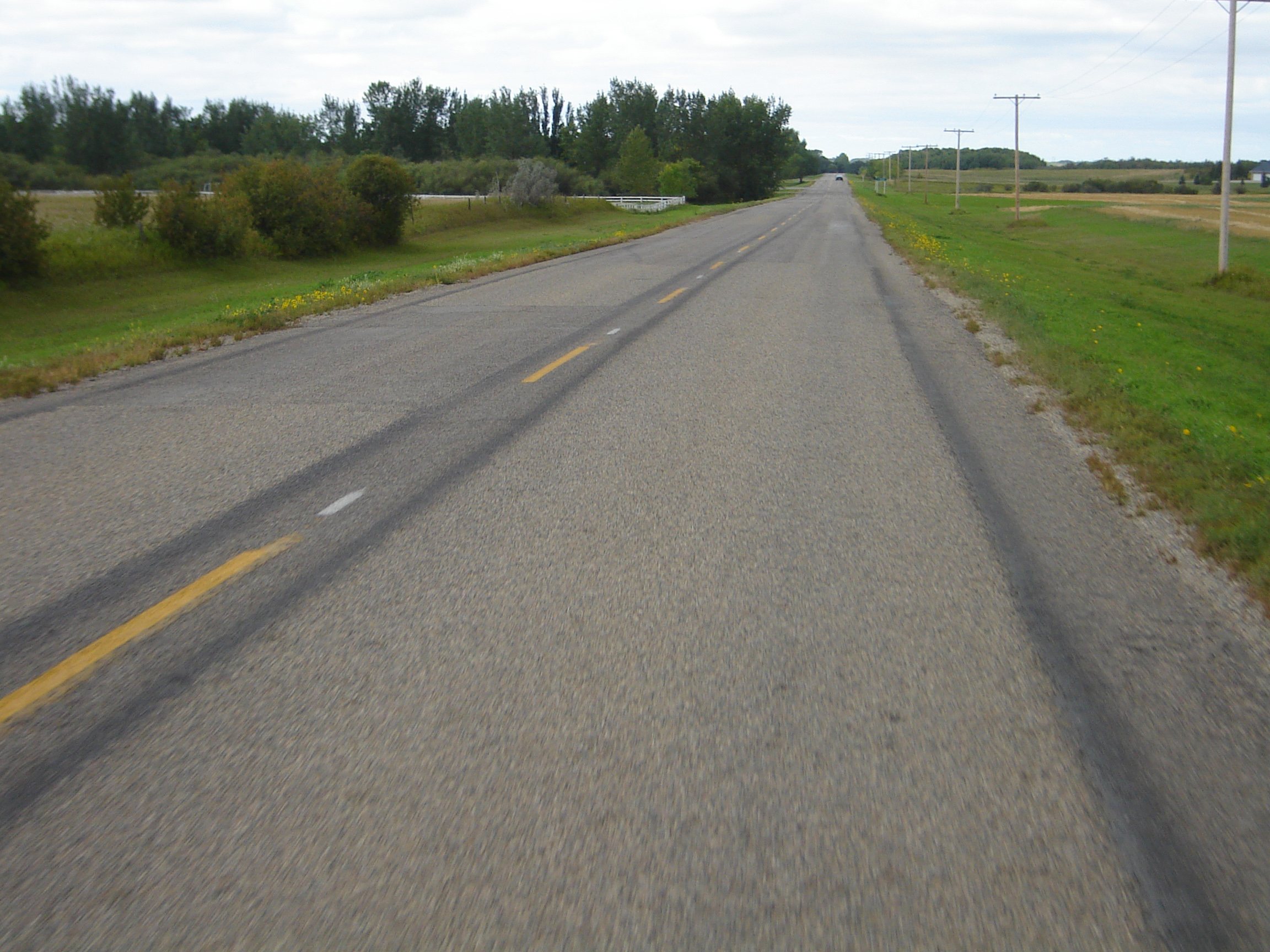 Grasswood Road Saskatchewan :en:Saskatchewan Roads}Road